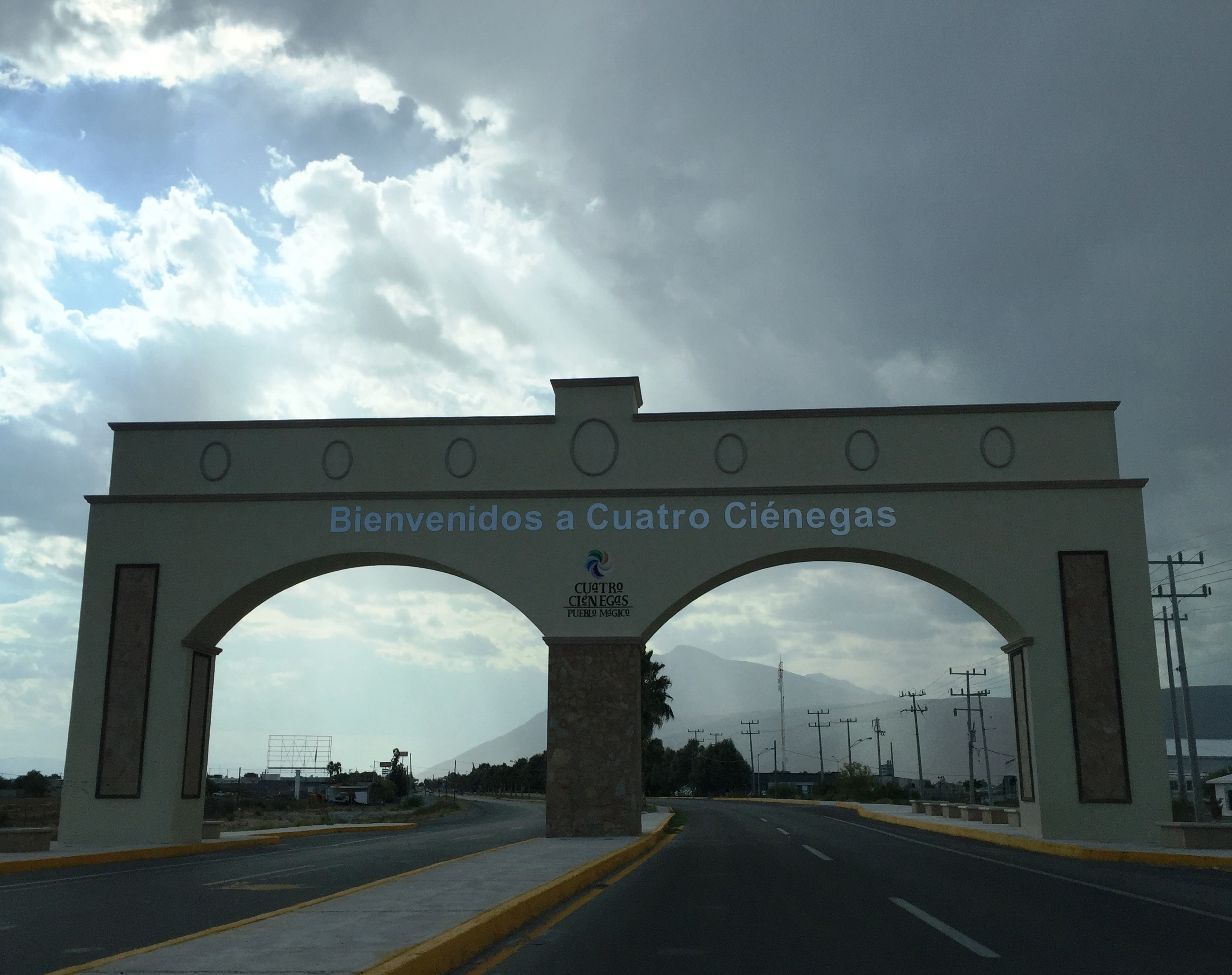 Arco de entrada al Pueblo Magico de Cuatrocienegas, Coahuila